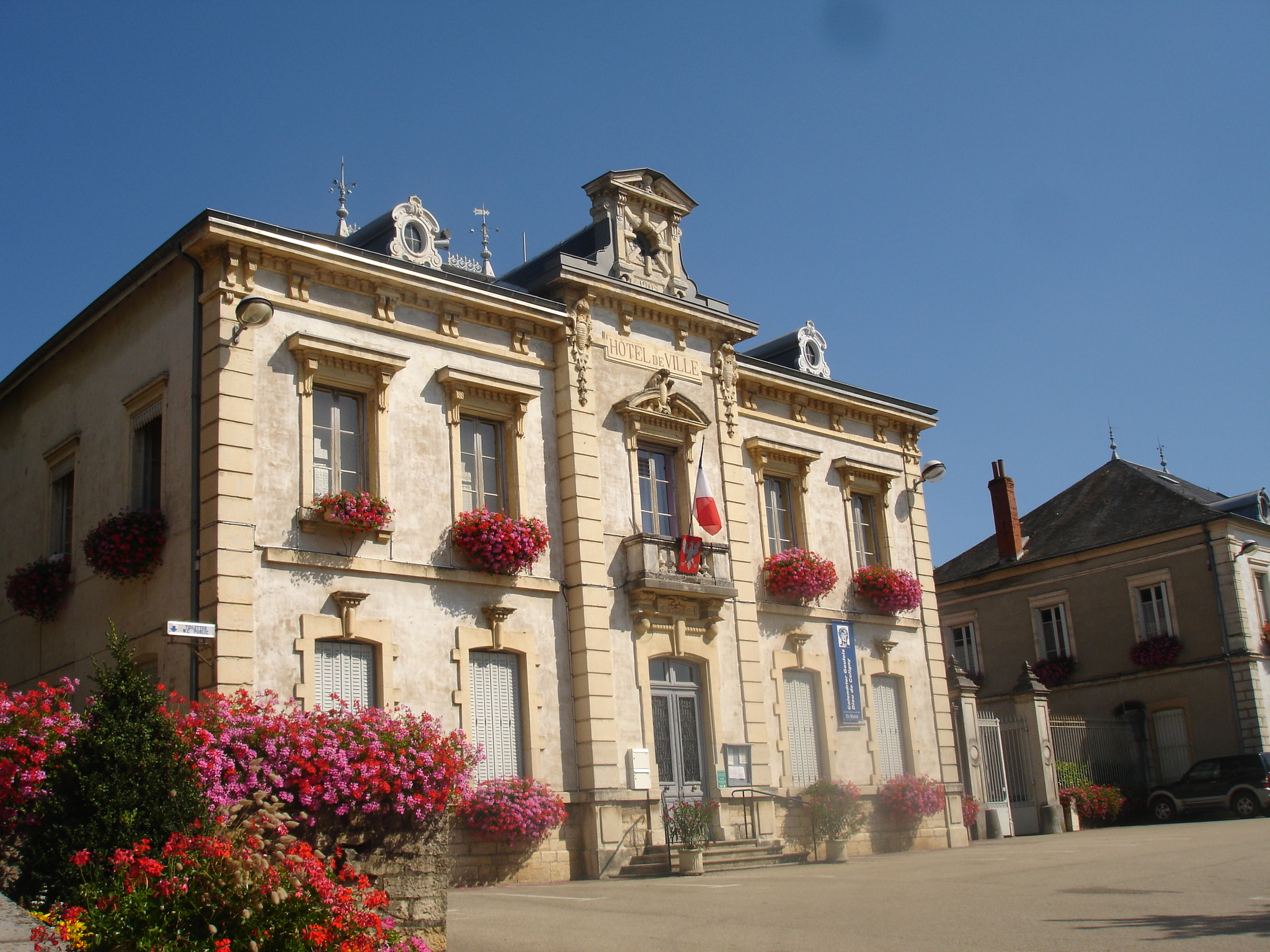 Façade de la mairie de Coligny dans le Revermont dans le département de l'Ain